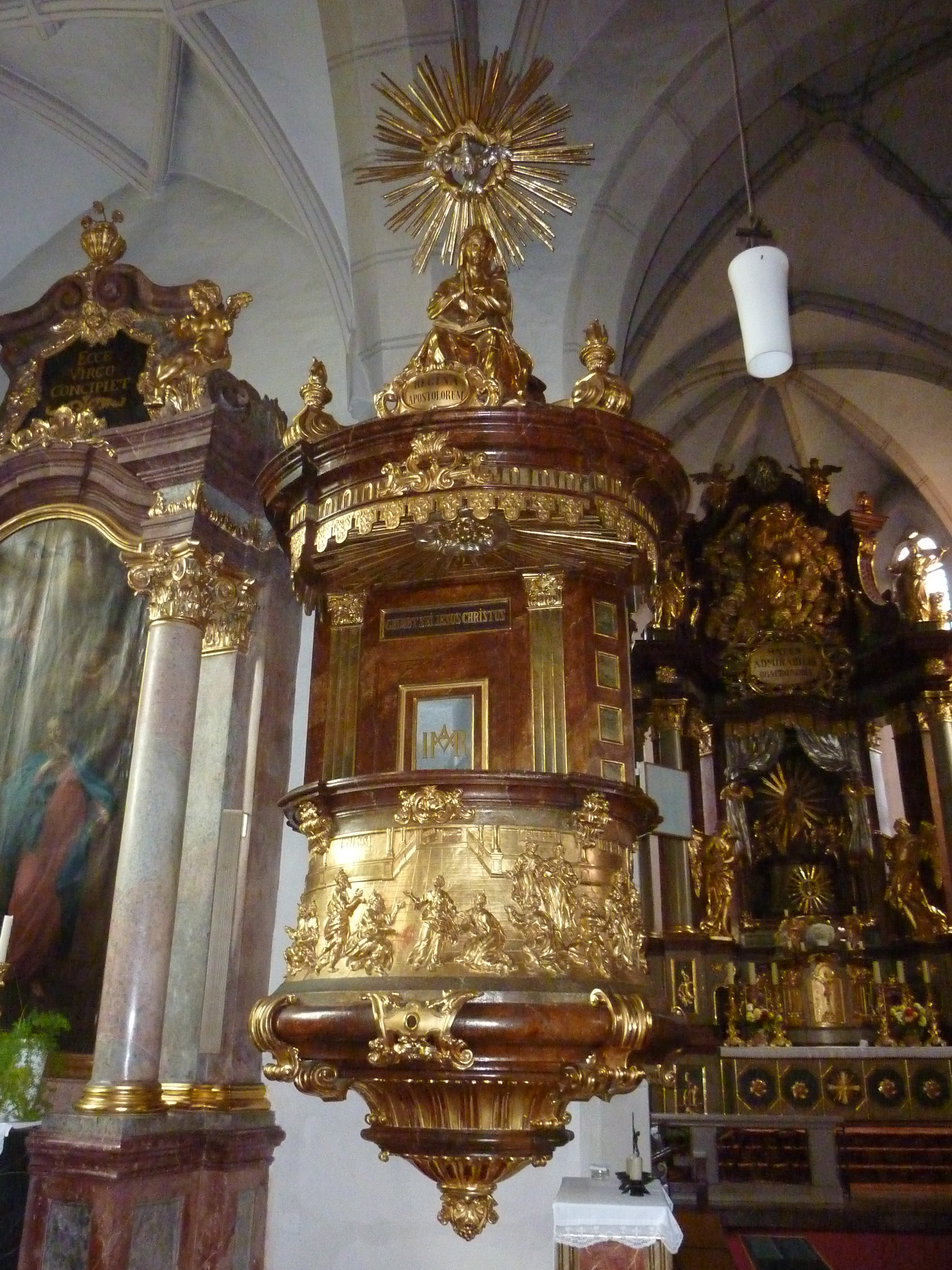 Kath. Pfarrkirche Mariae Himmelfahrt, Mank, Niederösterreich - Kanzel